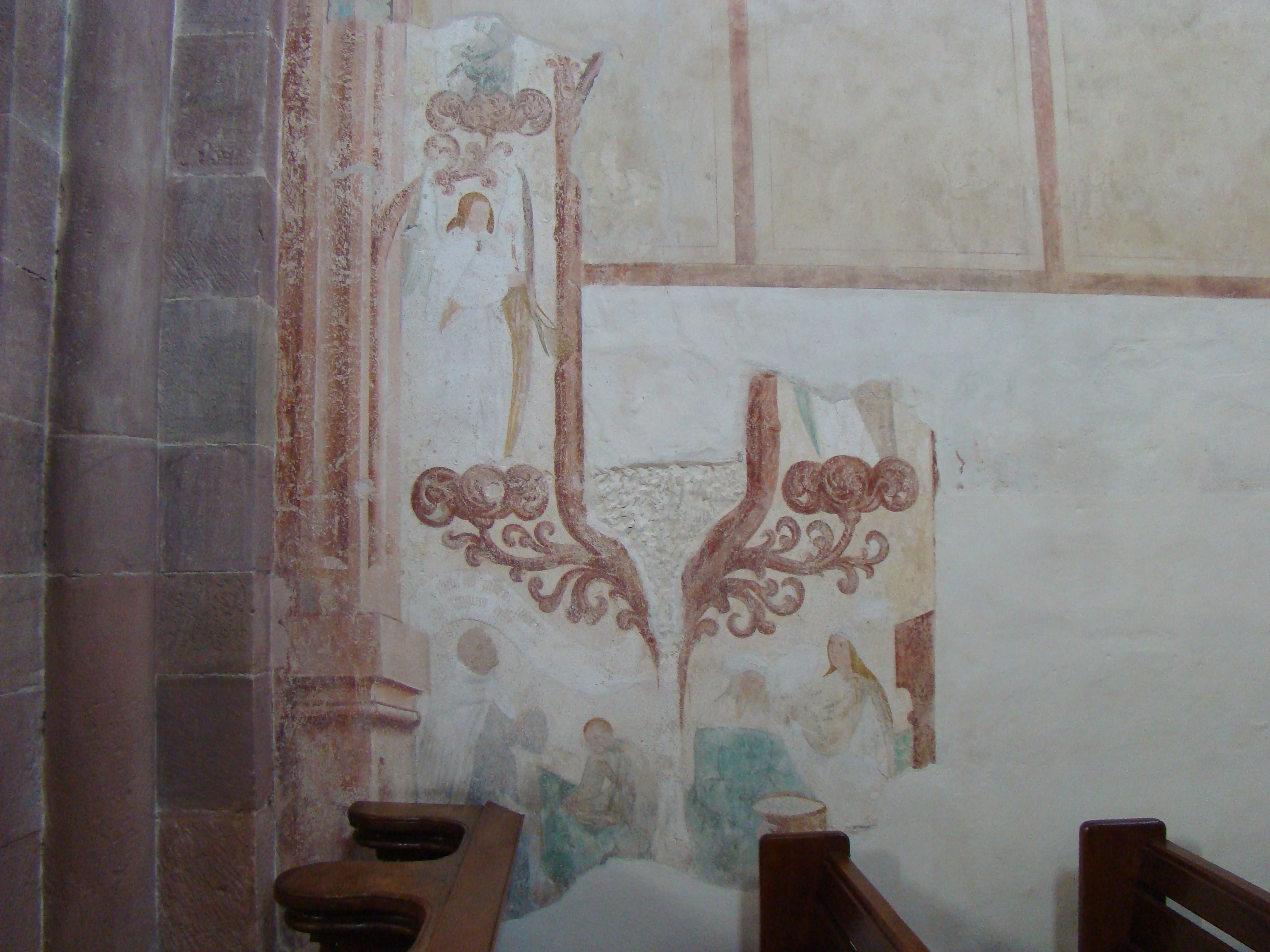 Klosterkirche Lobenfeld